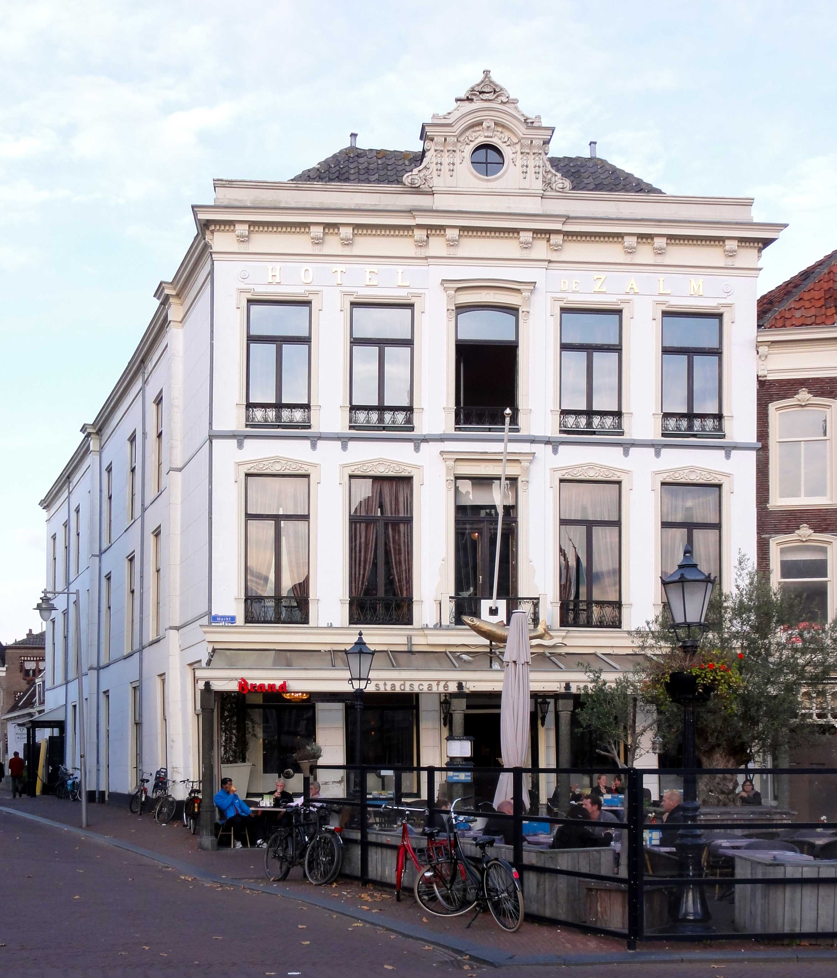 Hotel De Zalm op de Markt van Gouda